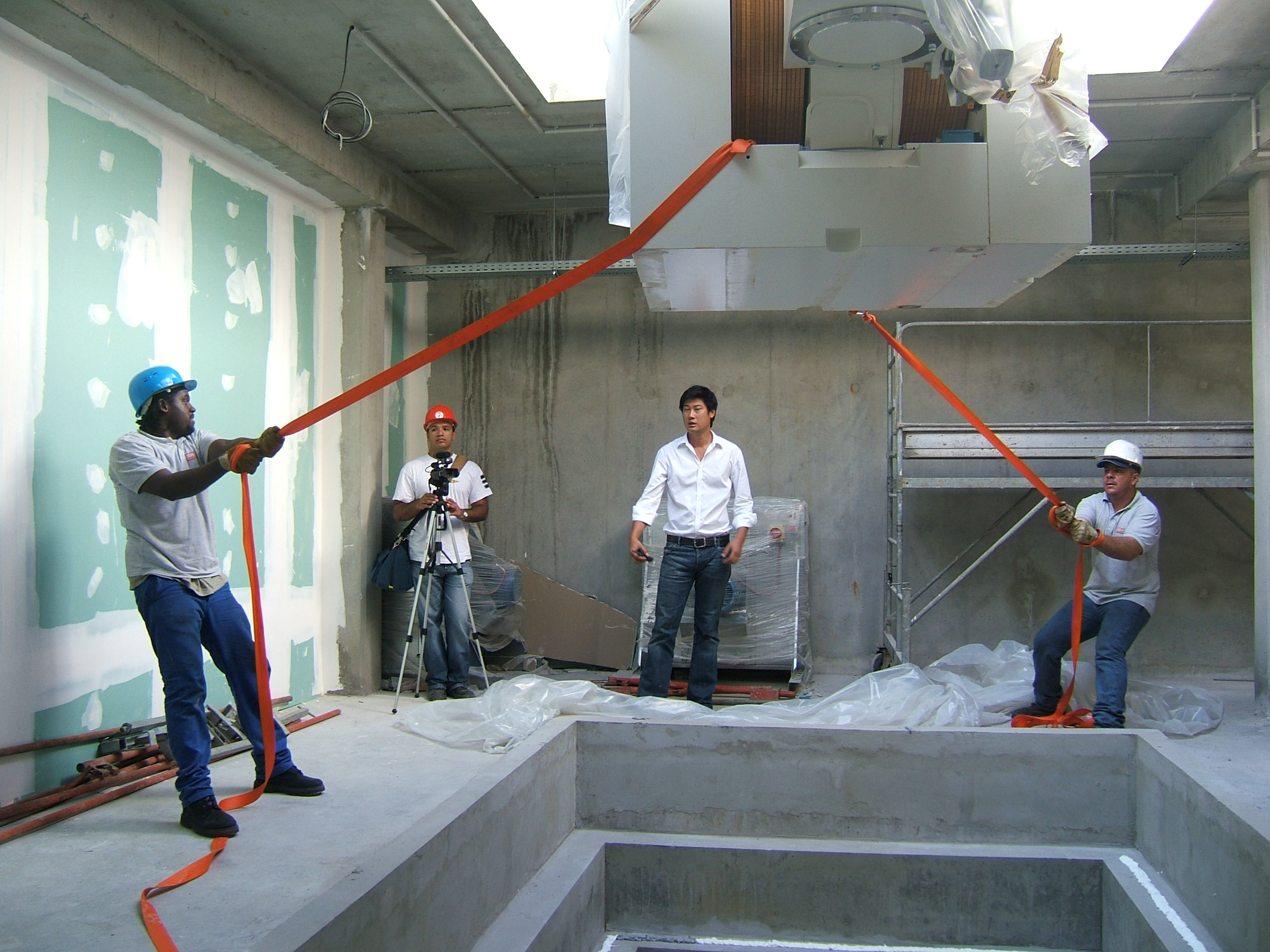 La livraison du premier cyclotron de la Réunion à la technopole de Saint-Denis